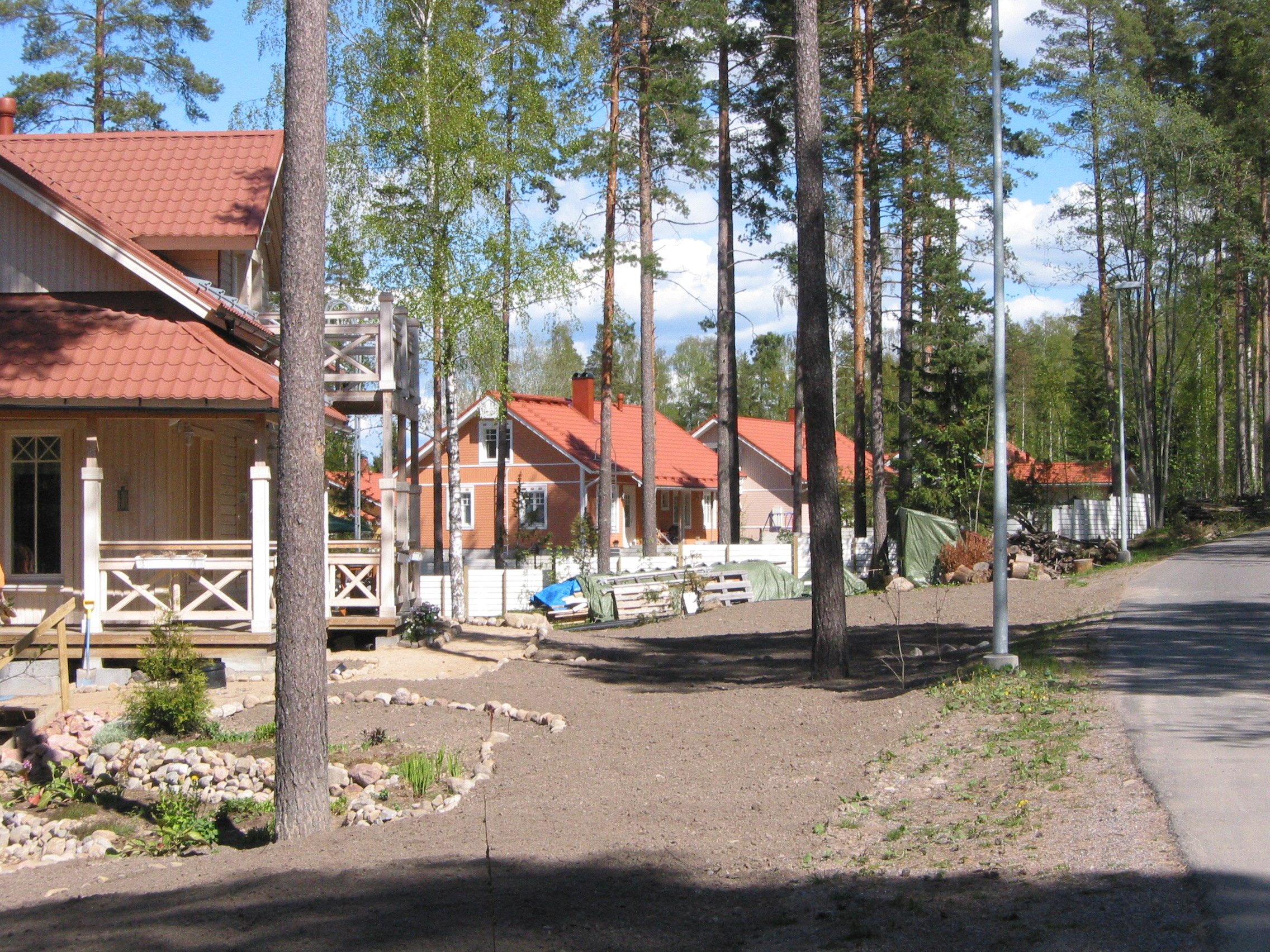 Vappulan omakotialuetta toukokuussa 2005